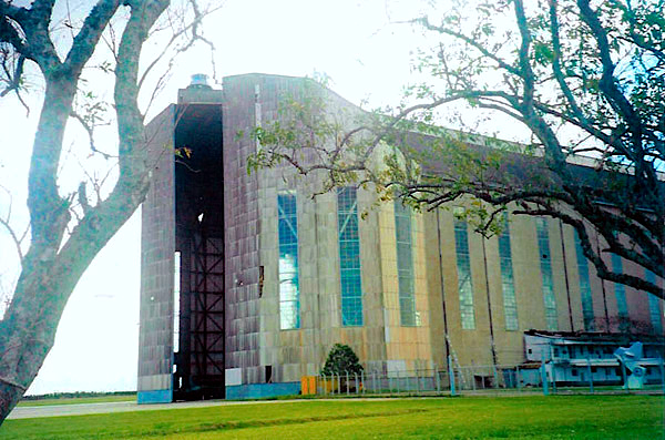 Hangar do Zeppelin da Base Aérea de Santa Cruz , Santa Cruz, Rio de Janeiro, RJ